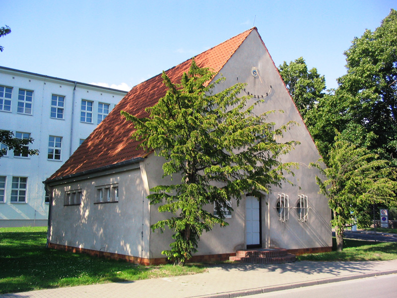 Beschreibung: Fachhochschule Stralsund - Haus 9 - Planetarium Fotograf: Darkone, 16. Juli 2004